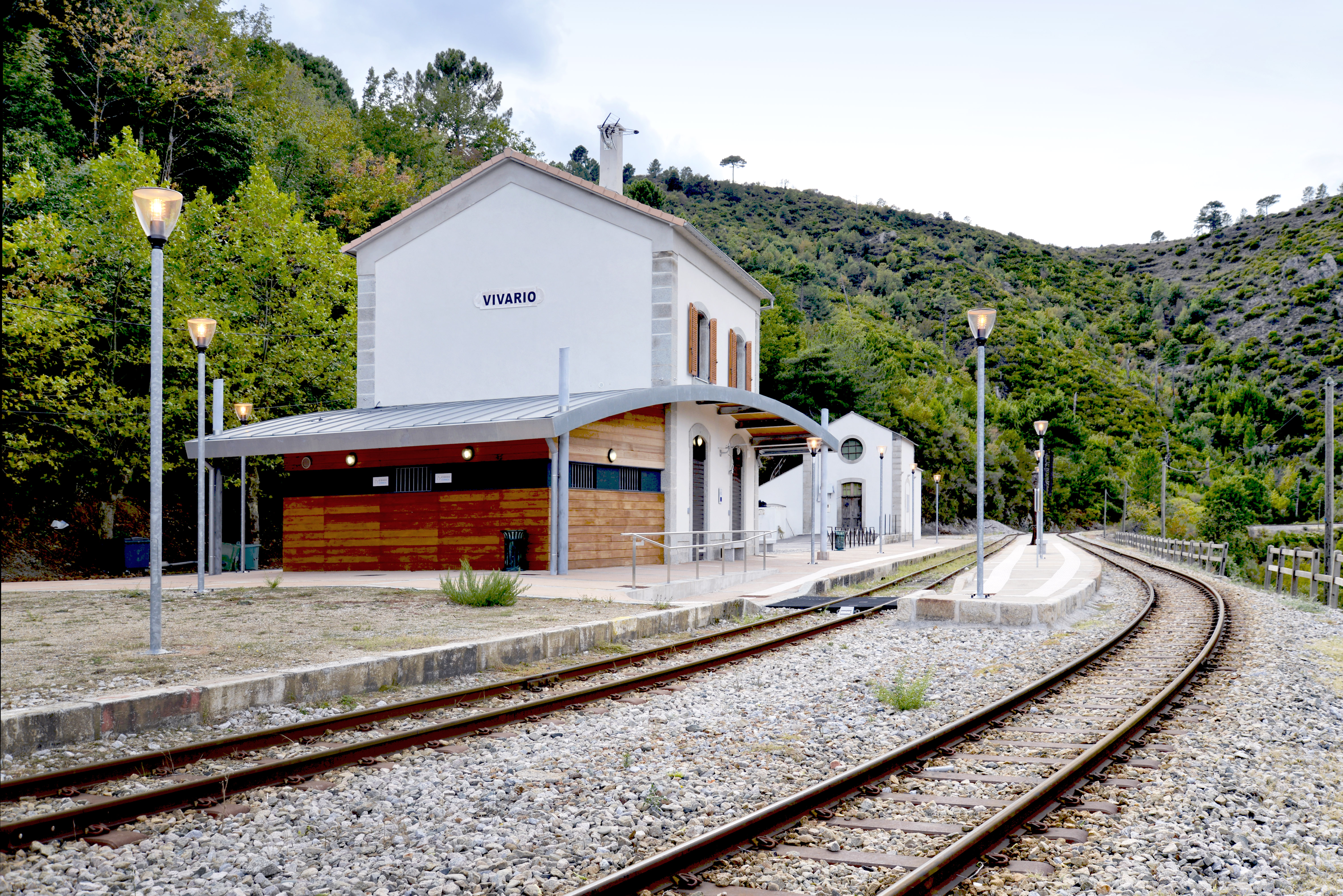 Vivario, Centre Corse - La nouvelle gare inaugurée le samedi 29 mai 2015.